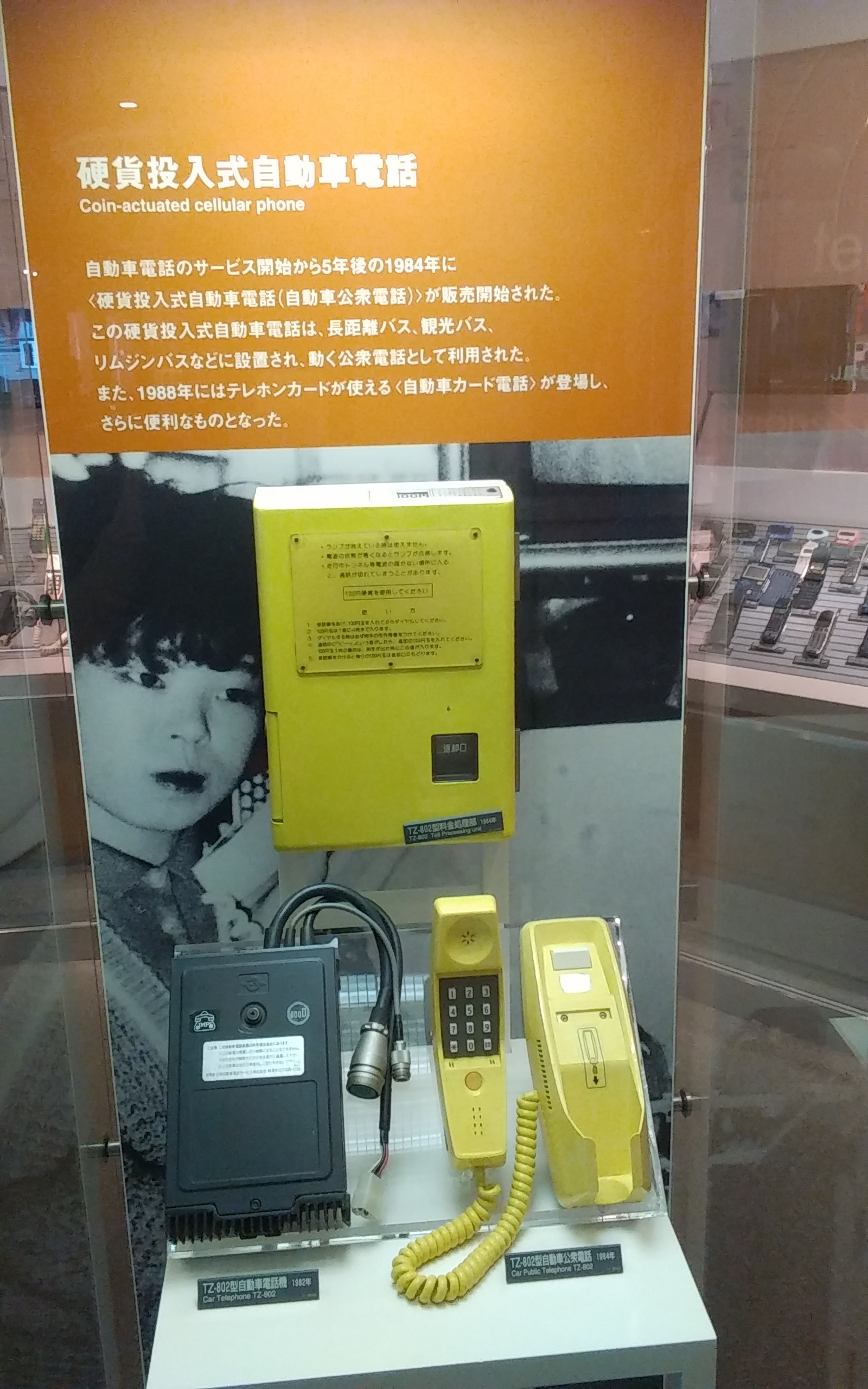 バス用公衆電話です。（コイン式）